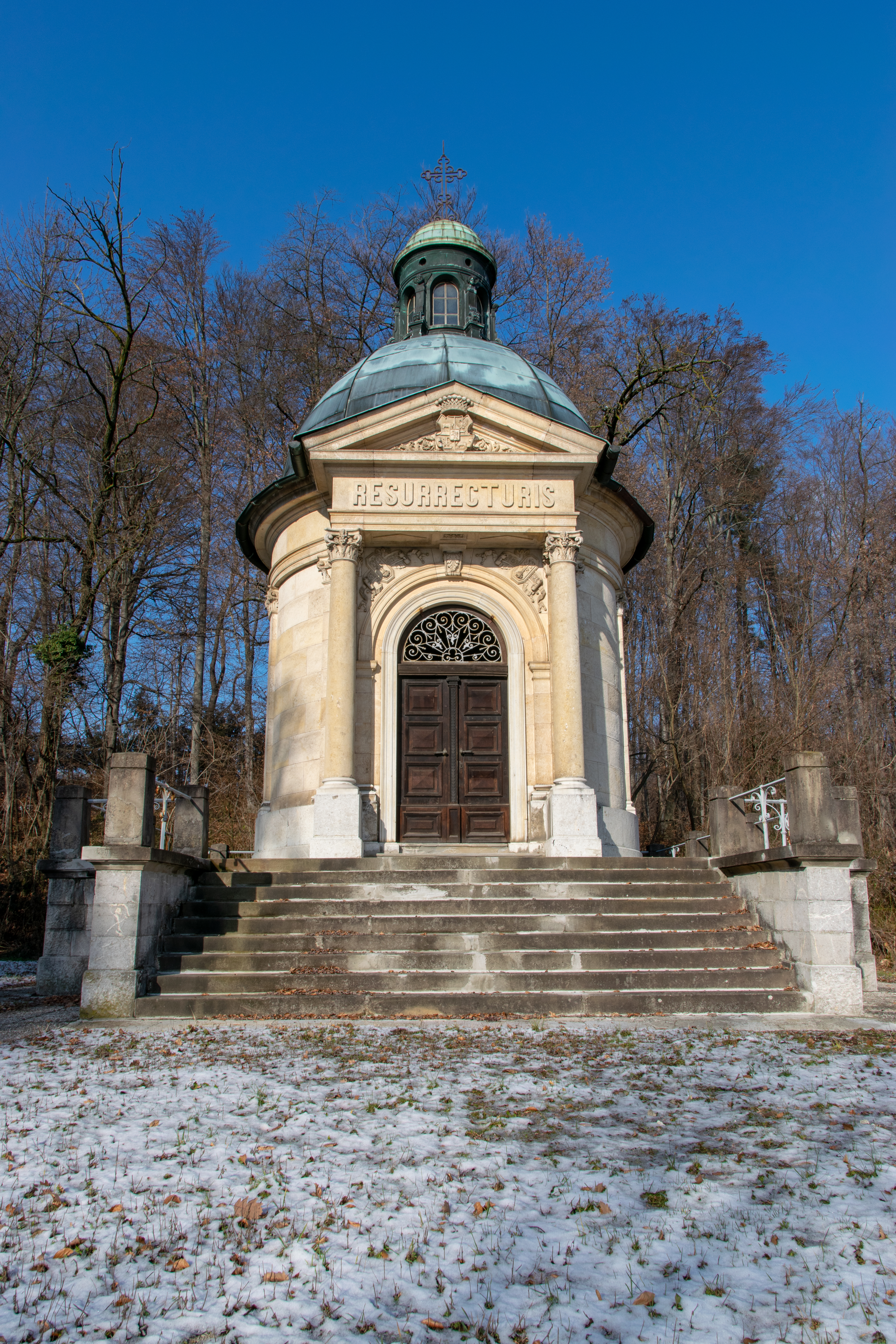 Mavzolej Anastazija Grüna